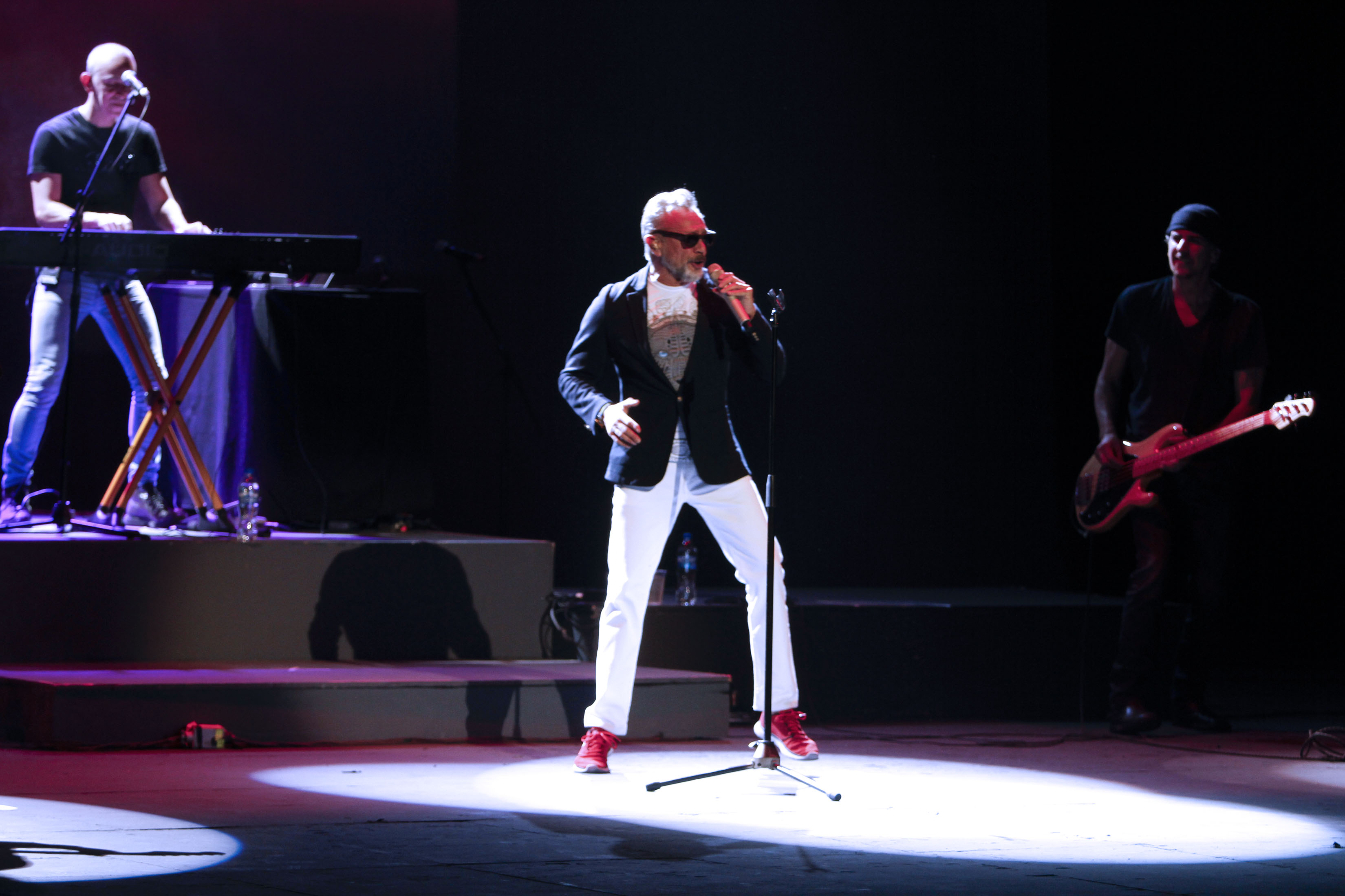 Viernes 27 de noviembre de 2015. En el Teatro de la Ciudad Esperanza Iris, se realizó el concierto del grupo español La Unión, donde presentaron en México su disco Hip-Gnosis, una compilación de sus éxitos con arreglos actuales. Los Hijos de Frida, fueron el grupo telonero. Fotografía: Milton Martínez/Secretaría de Cultura CDMX.